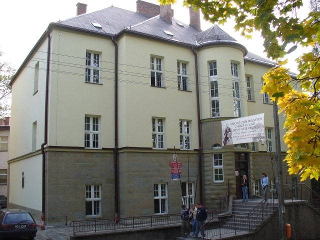 Budynek Liceum Ogólnokształcącego im. Hugona Kołłątaja w Jordanowie